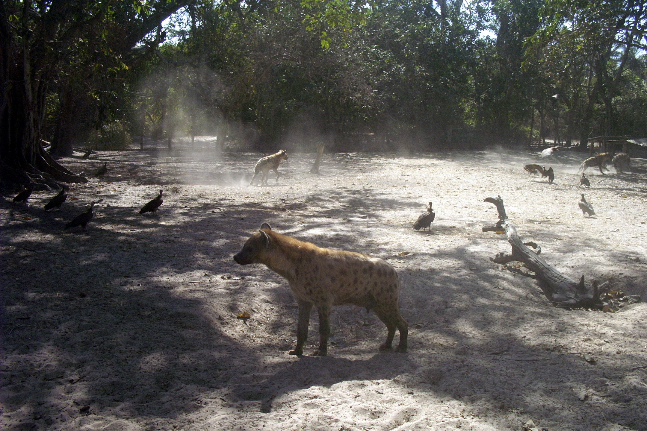 Crocuta crocuta